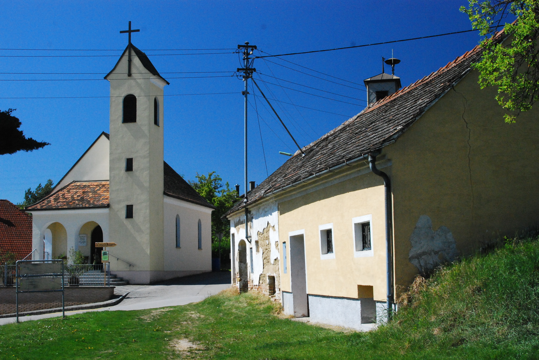 Kapelle von Eitzersthal in Niederösterreich